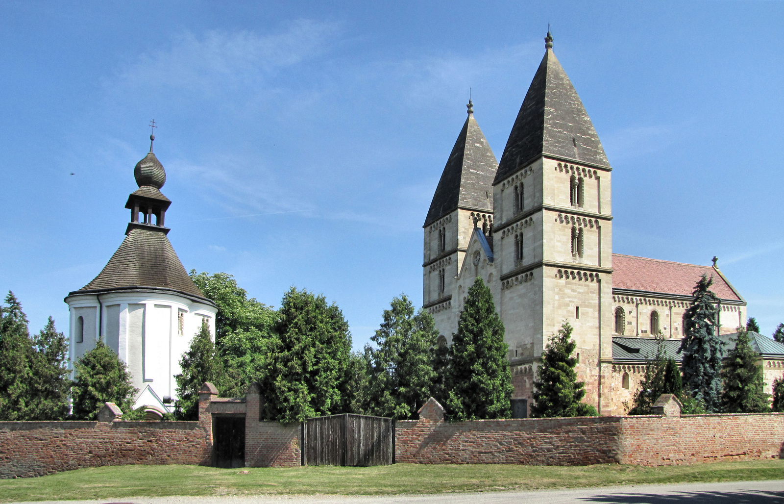 Szt. Jakab-kápolna (Ják, Szabadnép u.)